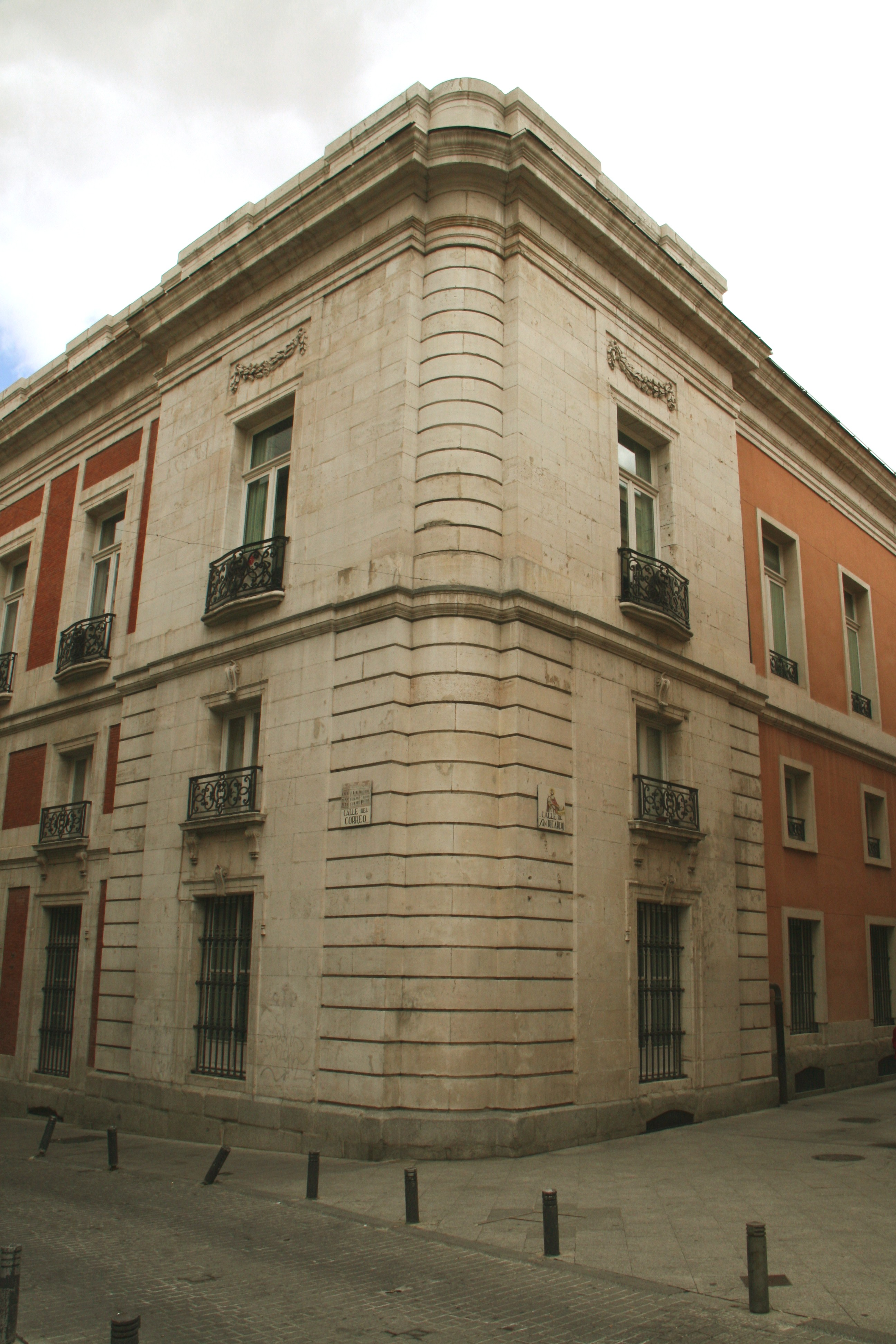 Trasera del edificio desde Pontejos